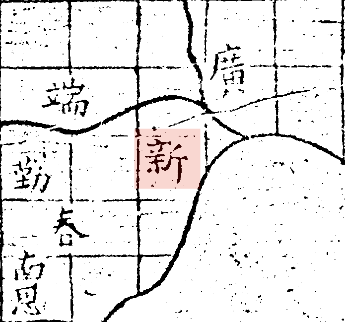 粵語: 禹跡圖入面嘅新州